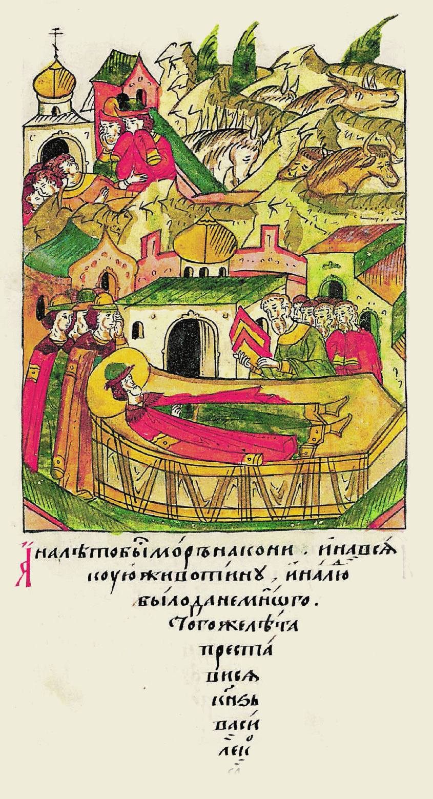 А летом был мор на коней и на всякую живо- тину, и на людей тоже был мор, но немного. В том же году скон- чался князь Василий Косой